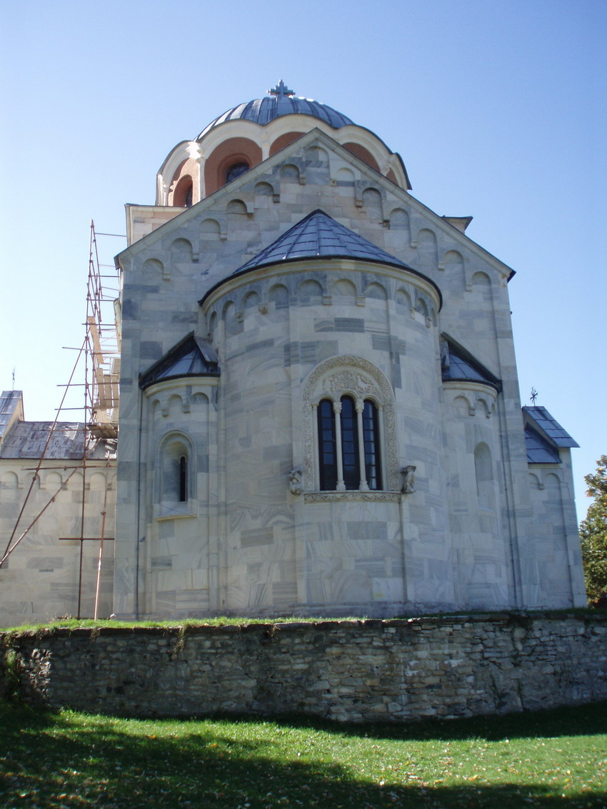 Studenica Monastery